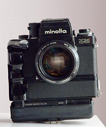 eigen foto, vrijgegeven.